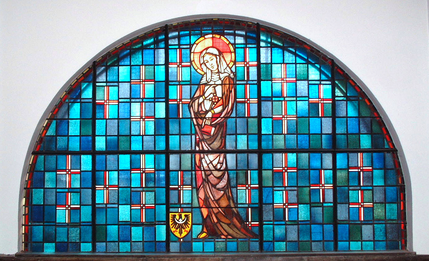 Hedwigsfenster i, Turmgestaltet nach dem Schlackenwerther Kodex aus dem Jahre 1353